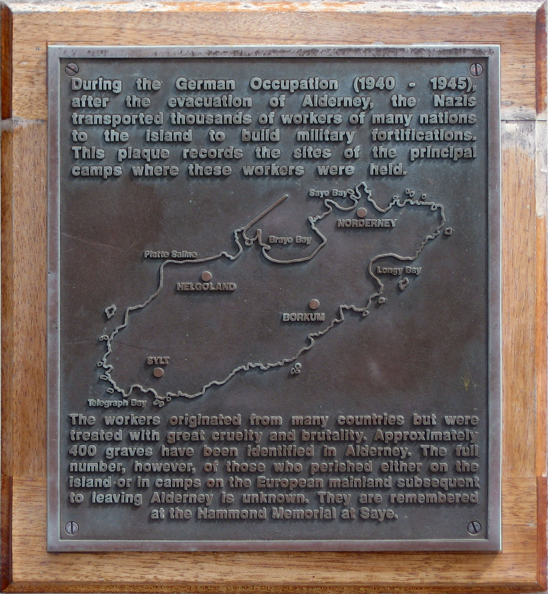 Lageplan Konzentrationslager Aldeney